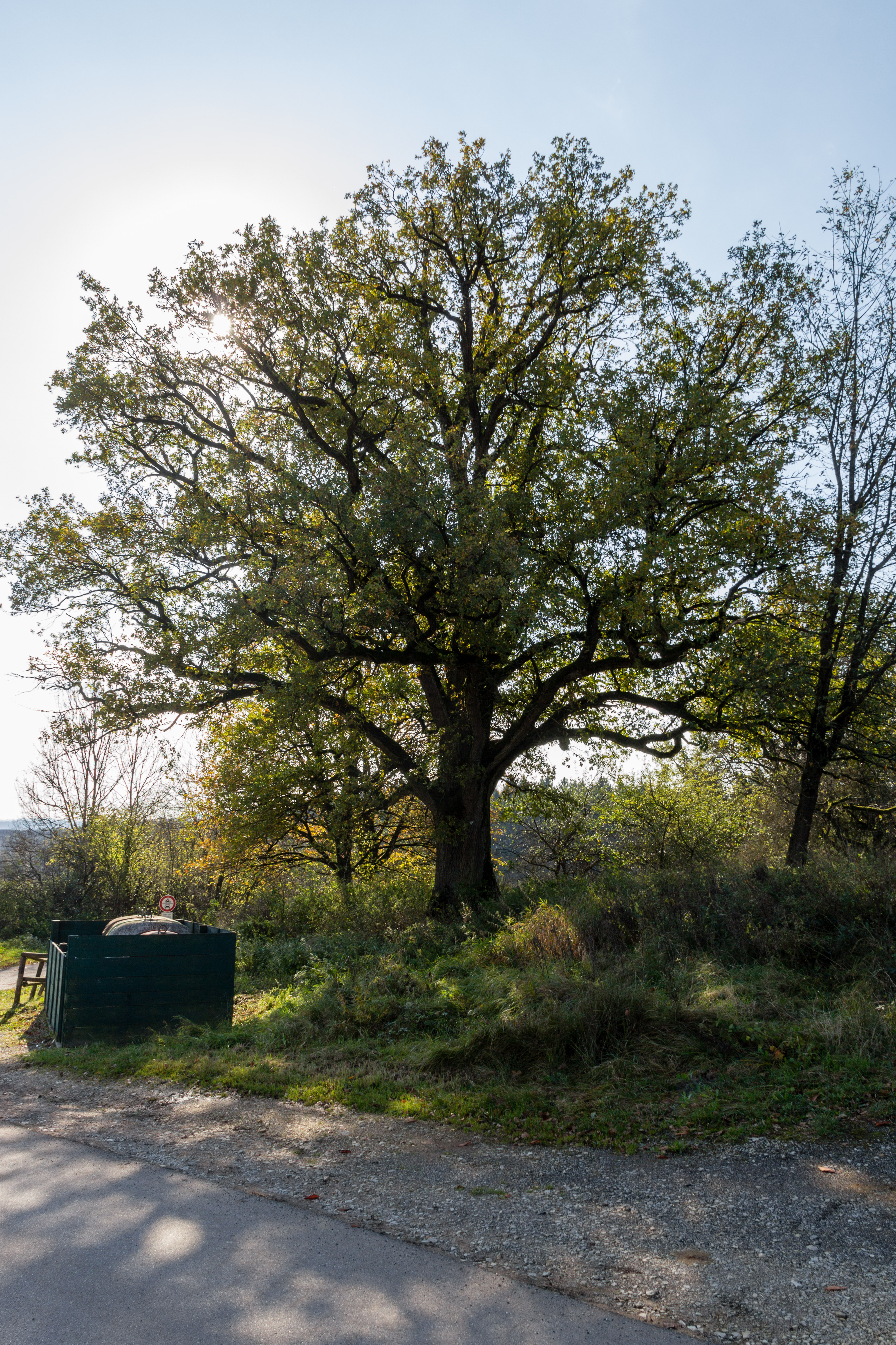 Altdorf, Pühlheim, Dorfeiche, Naturdenmal